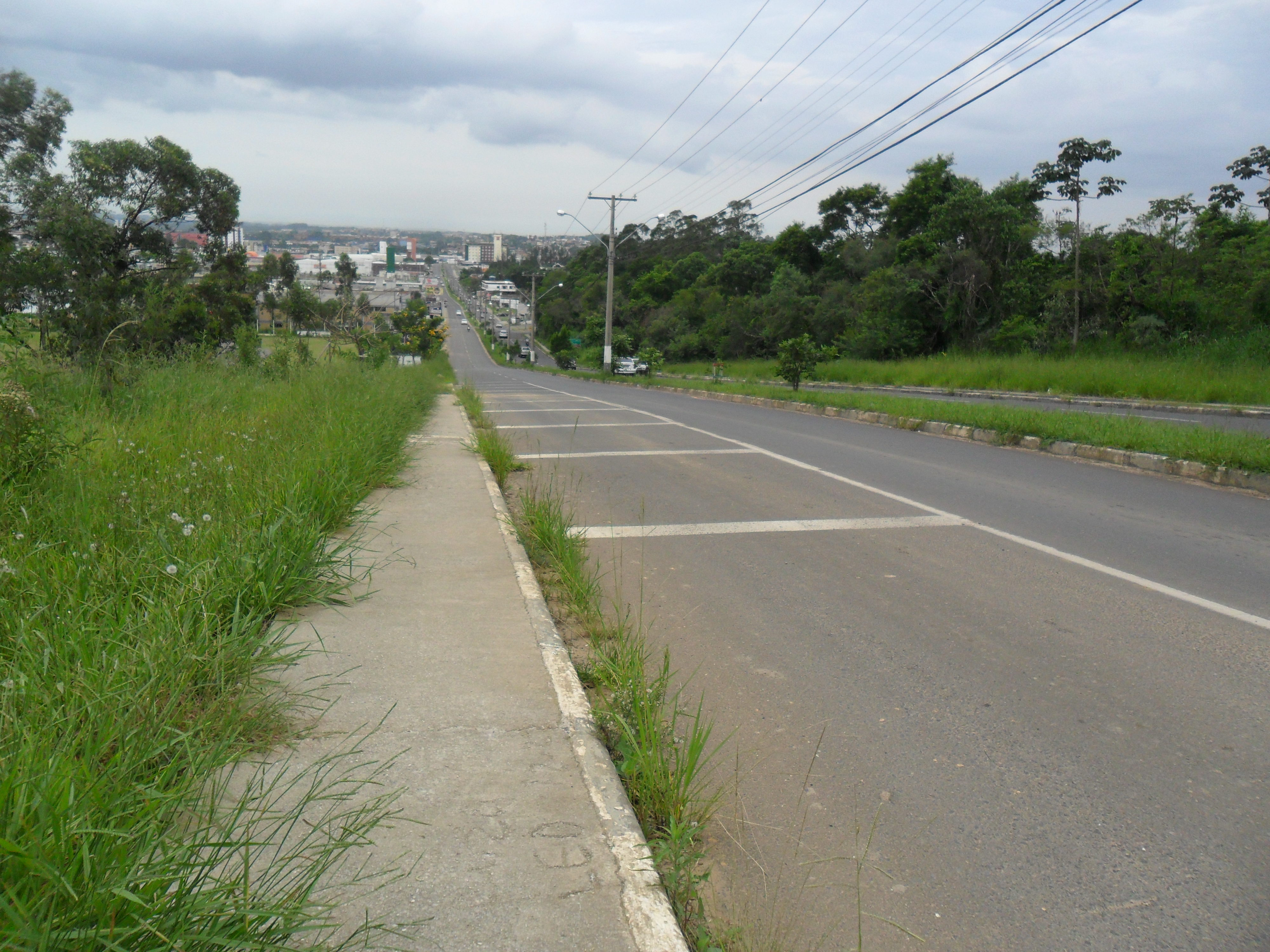 A avenida Gabriel Zanette, Criciúma, SC, Brasil.